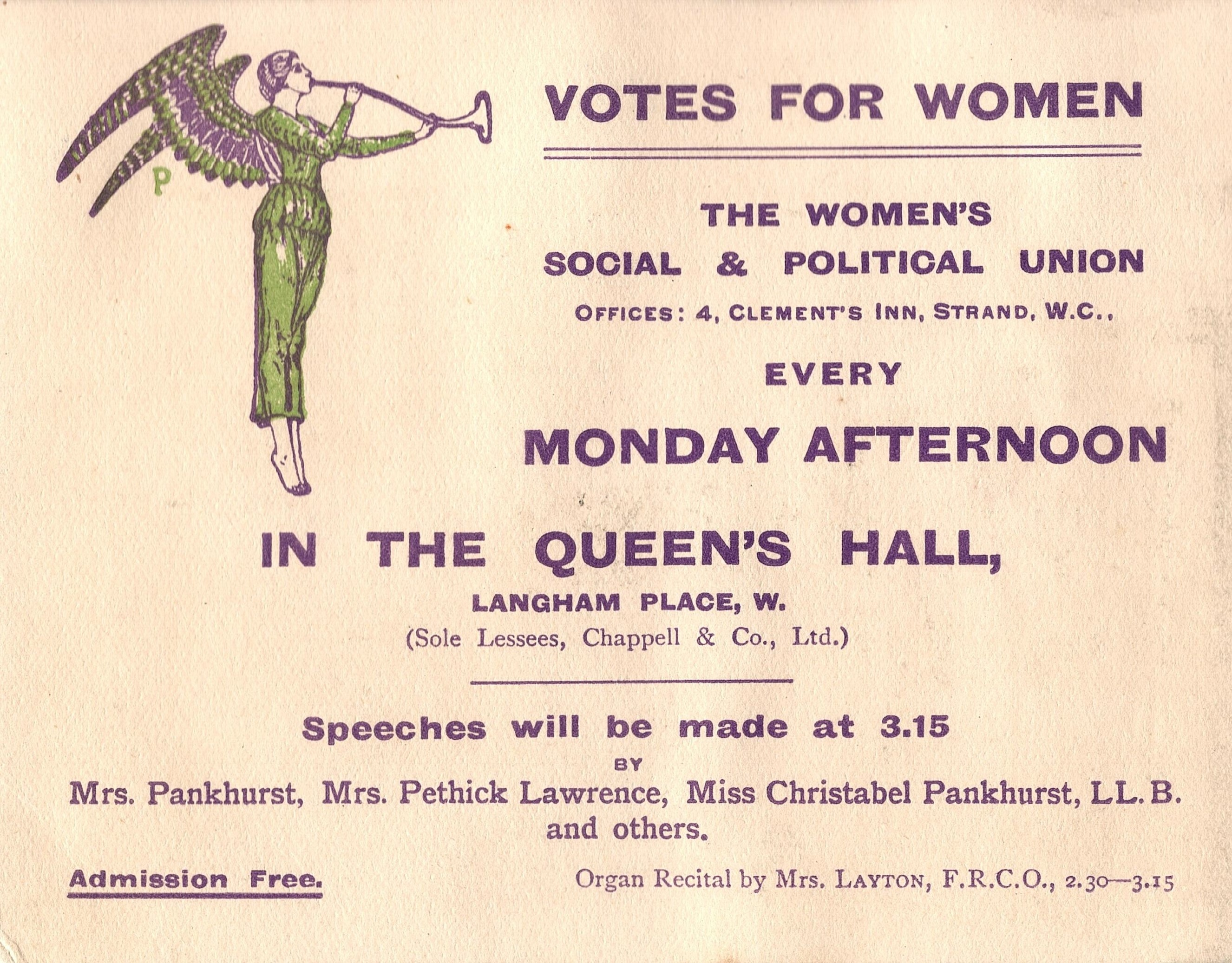 twl 2011 19